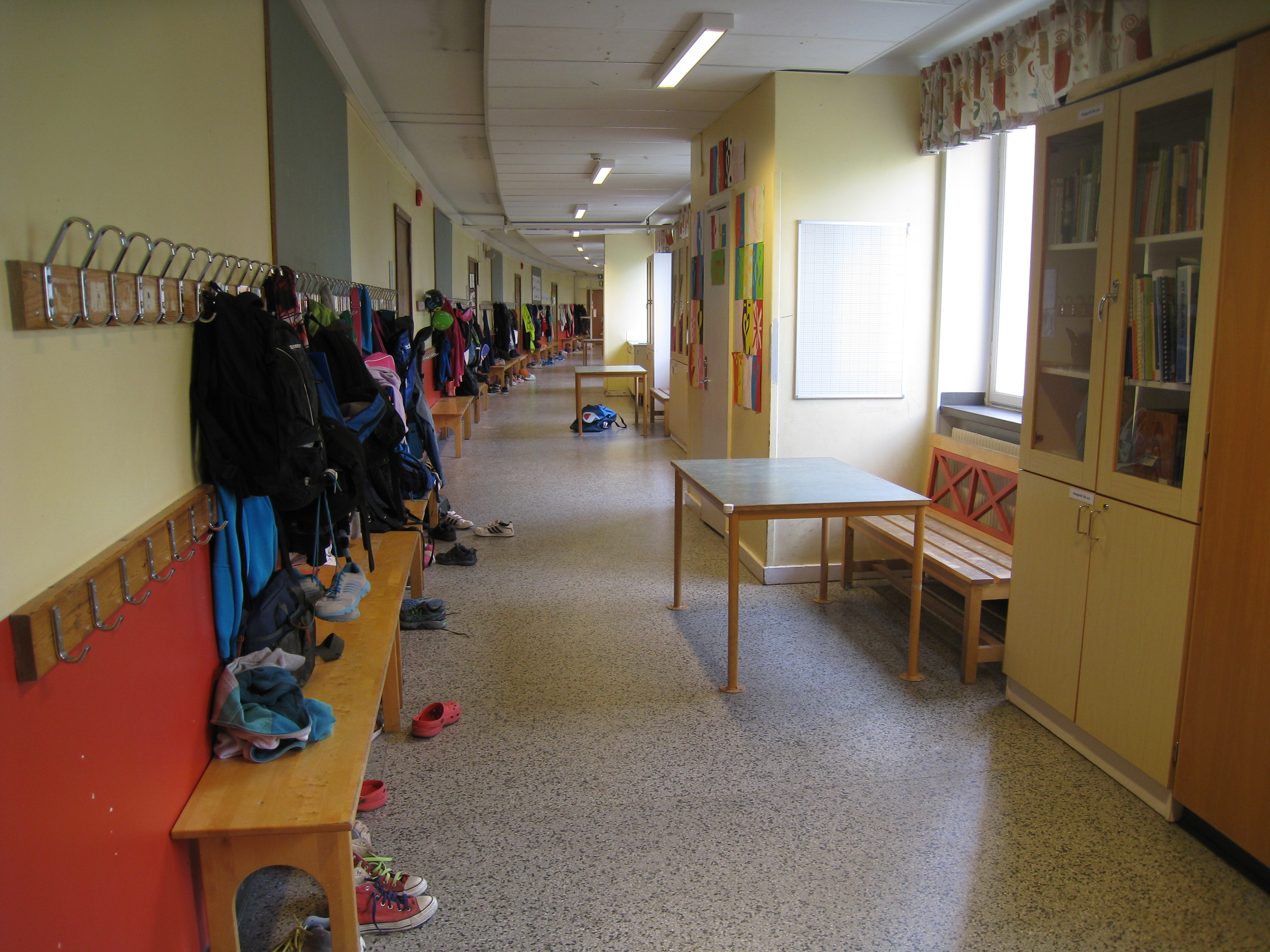 Olovslundsskolan i Olovslund, Bromma. Interiör med korridor i huvudbyggnadens svängda del.